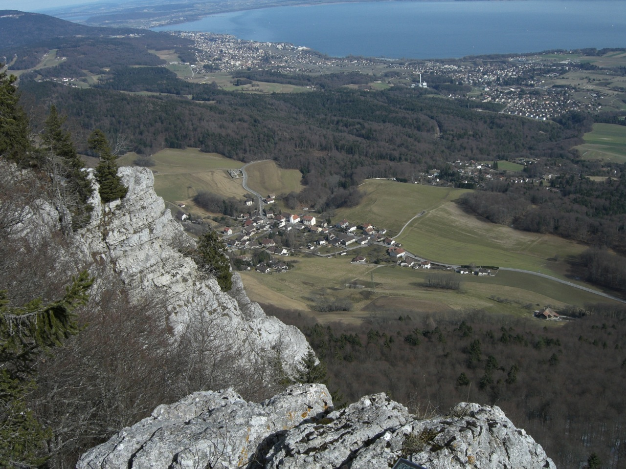 Au deuxième plan, le village de Rochefort vu du nord, depuis le point de vue panoramique du Rocher de Tablettes au col de La Tourne. En arrière plan, le littoral du lac de Neuchâtel